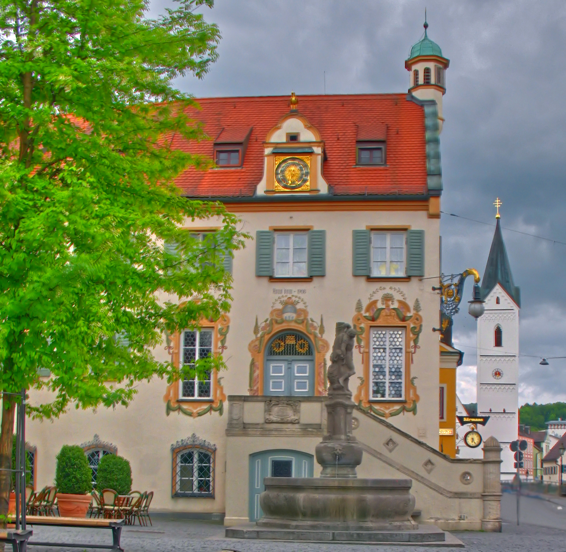 Deutschland, Bayern, Fürstenfeldbruck, Altes Rathaus und Kirche St. Leonhard